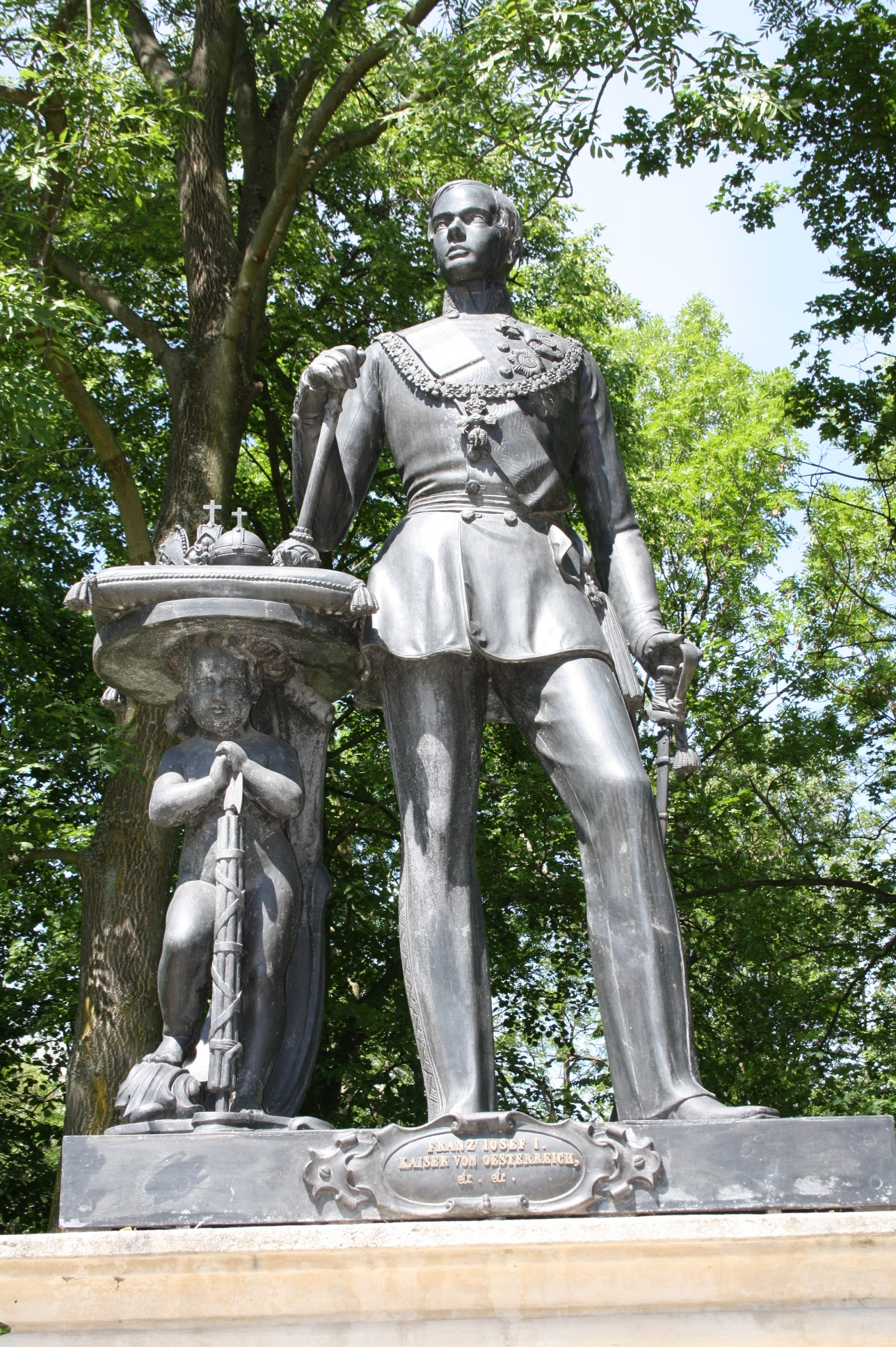 Büste in der Gedenkstätte Heldenberg (Niederösterreich)